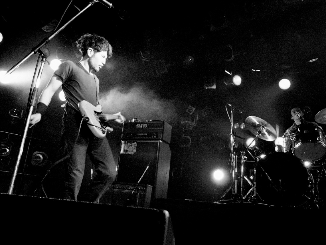 GOUPIL AND C Live@渋谷クラブクアトロ 20090226